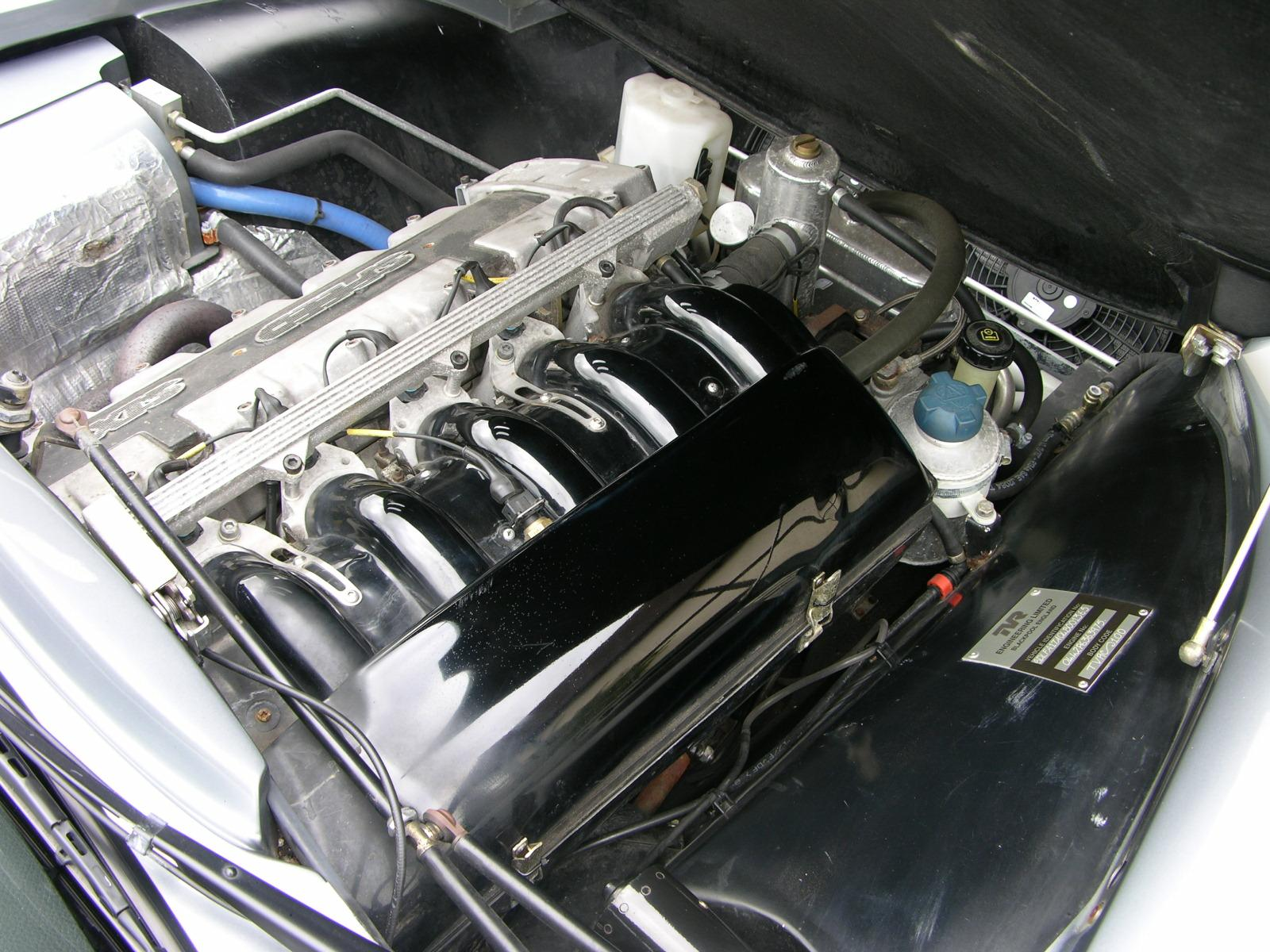 TVR Tamora.